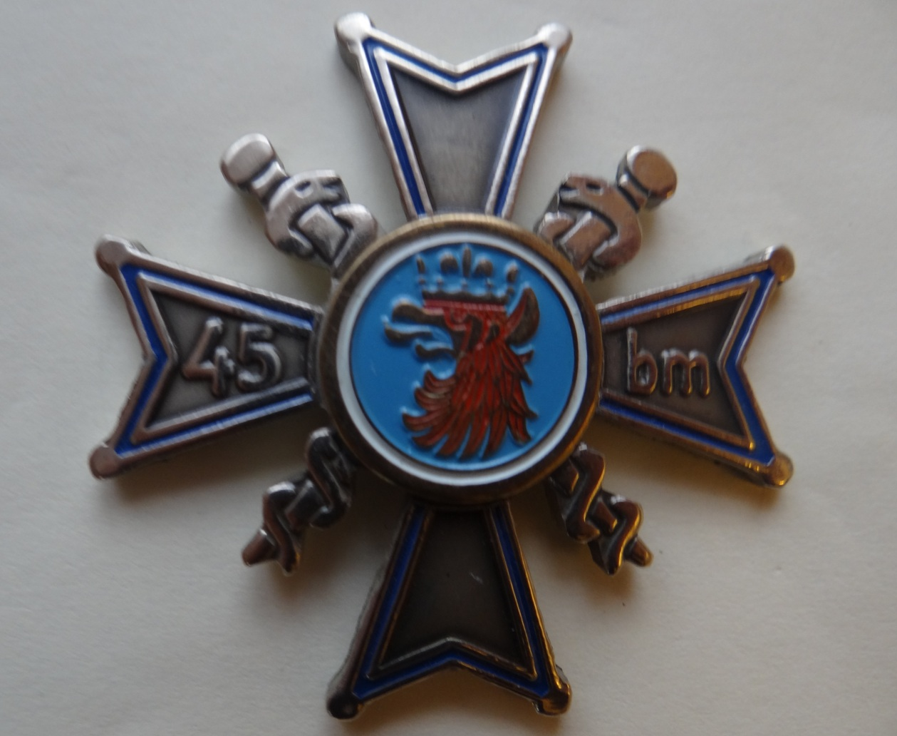 Żołnierska odznaka pamiątkowa 45 Batalionu Medycznego